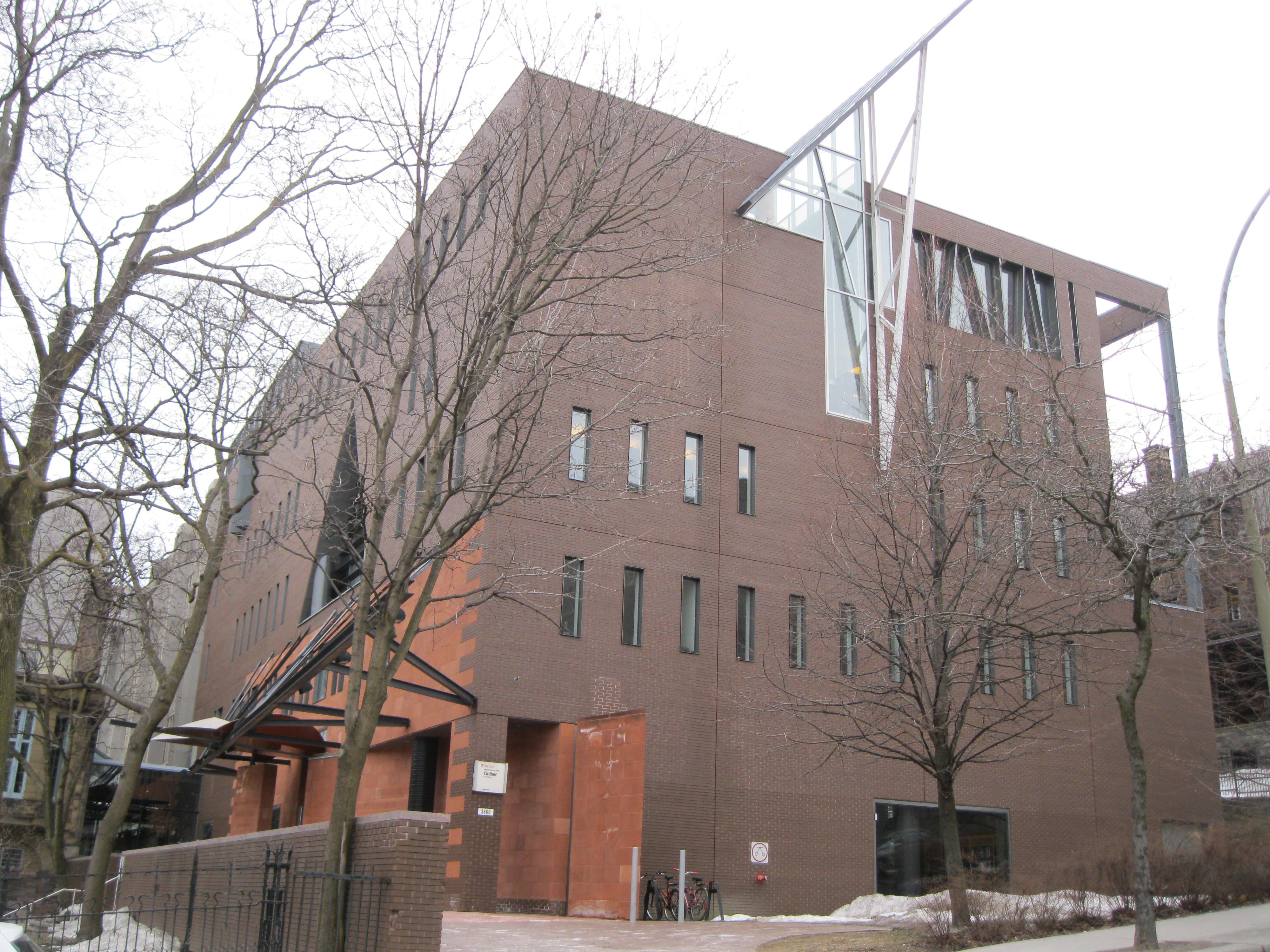 McGill University downtown campus